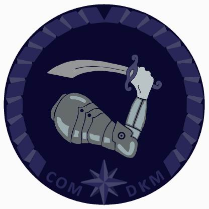 Centrum Operacji Morskich - Dowództwo Komponentu Morskiego – oznaka rozpoznawcza na mundur polowy – 2015, Polska.